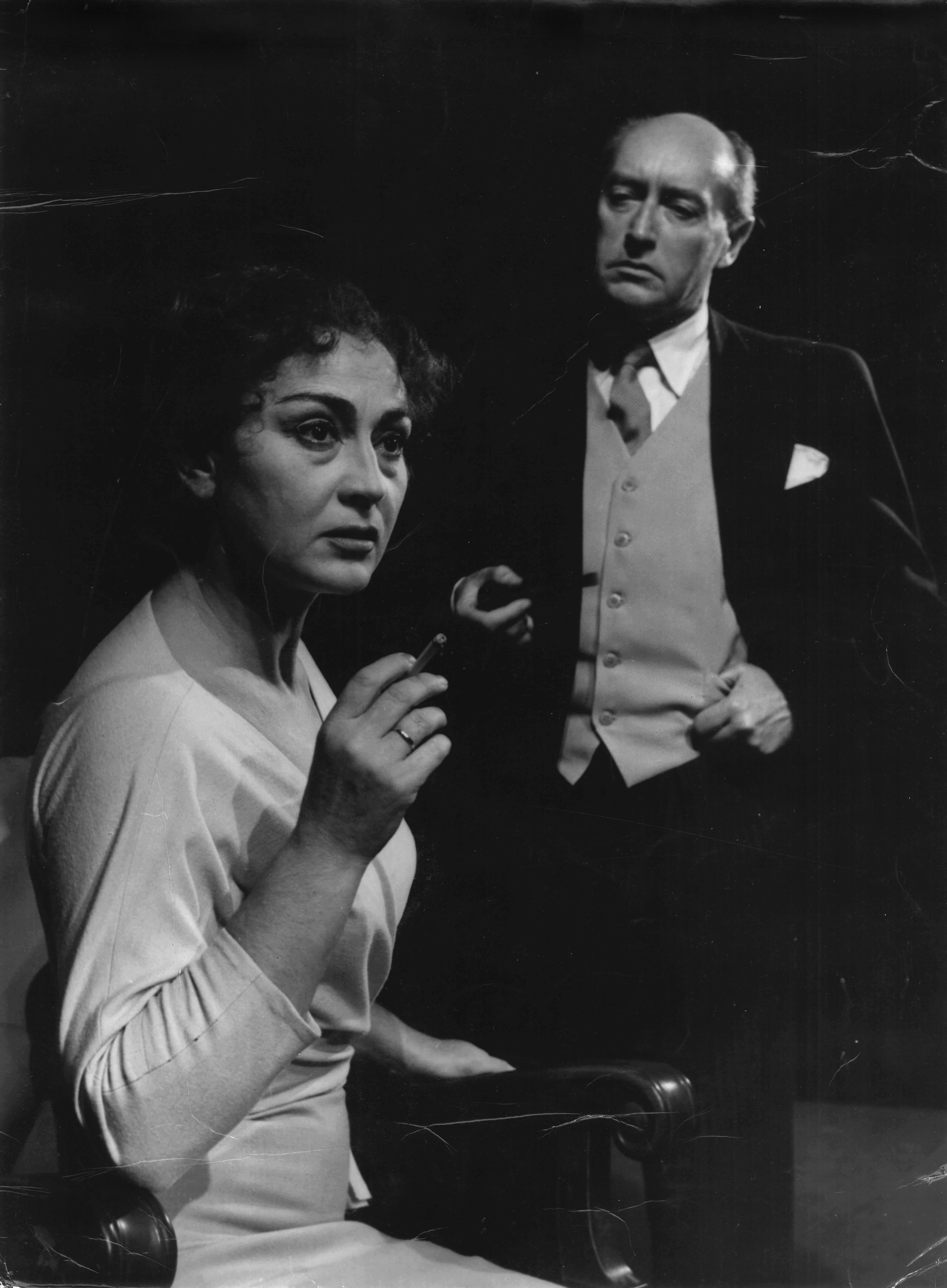 Komad U agoniji Marija Crnobori, Mata Milosevic, 1959. Autor fotografije Stevan Kragujević (po odobrenju Tanje Kragujević)